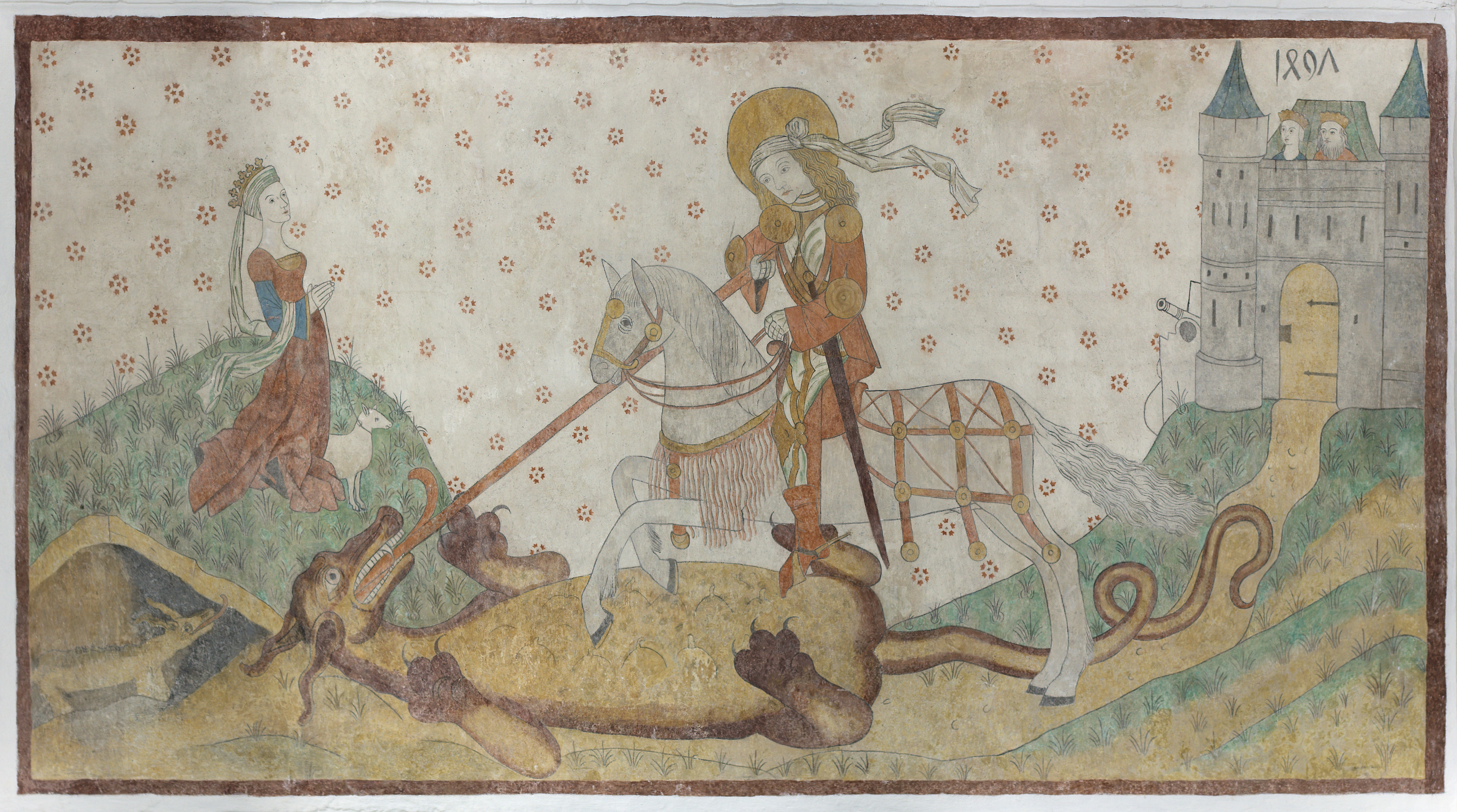 Skt. Georg og dragen - kalkmaleri i Aarhus Domkirke